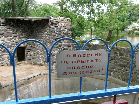 Менський зоопарк, травень 2010 року